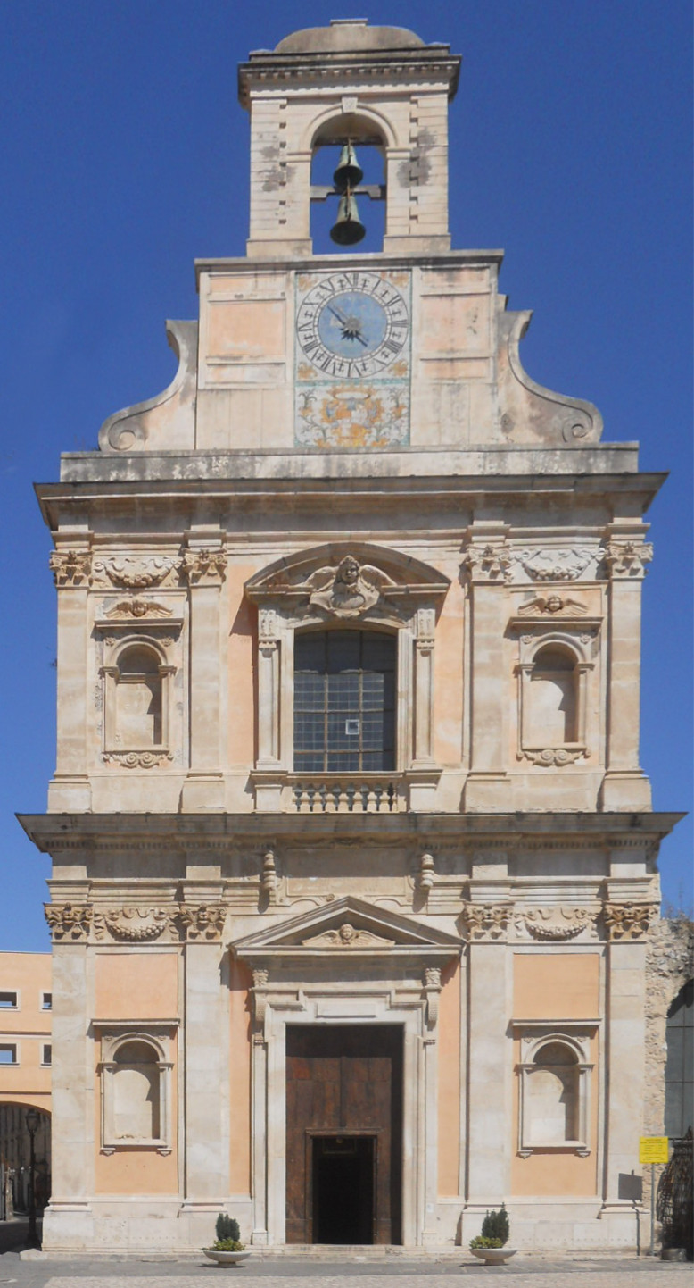 La facciata.